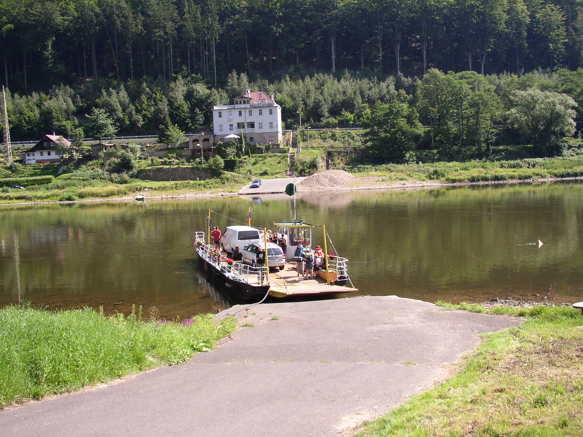 Přívoz Dolní Žleb, Děčín , okres Děčín, Česká republika